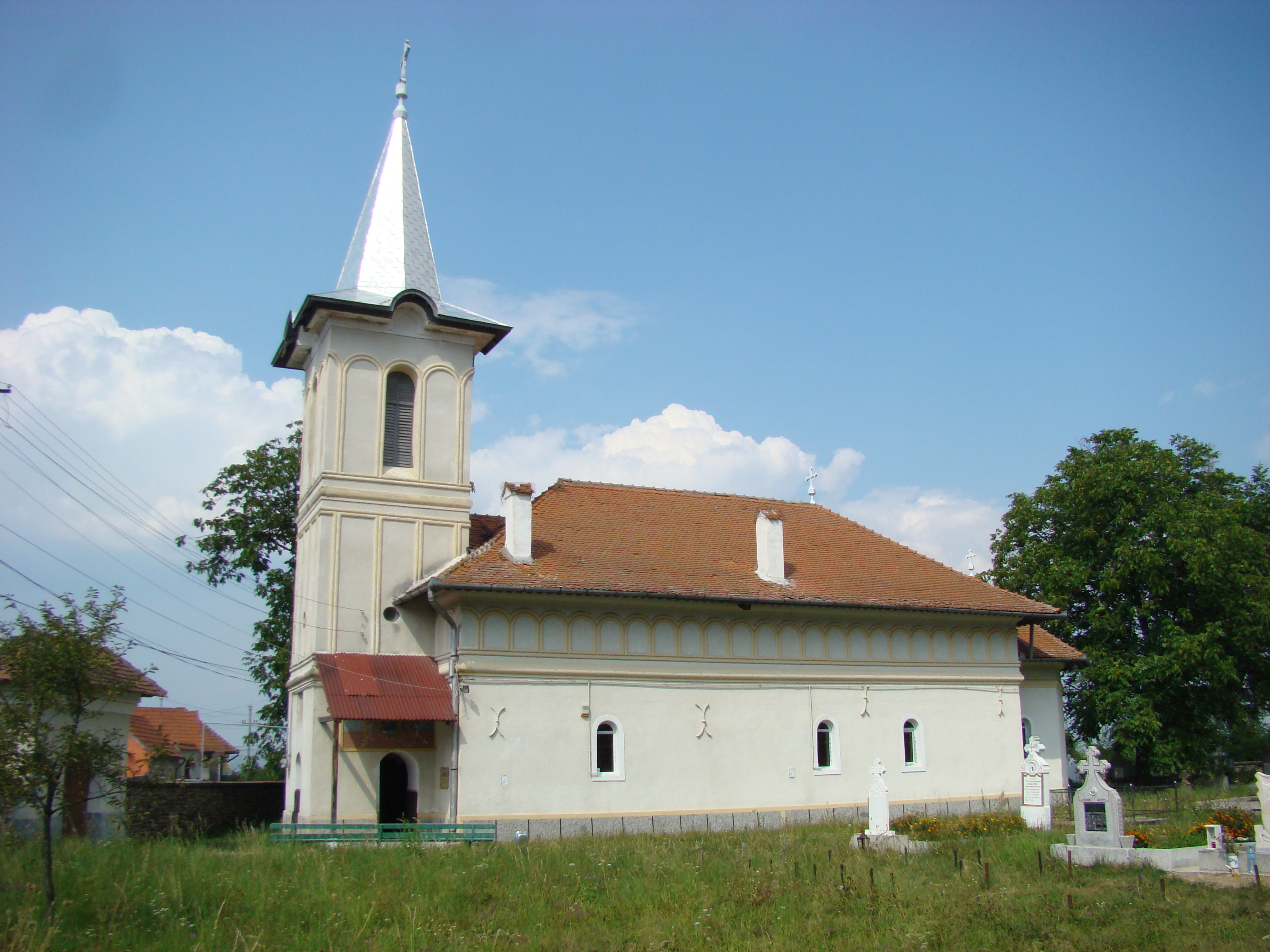 Biserica "Adormirea Maicii Domnului", sat Arpașu de Sus; comuna Arpașu de Jos, județul Sibiu